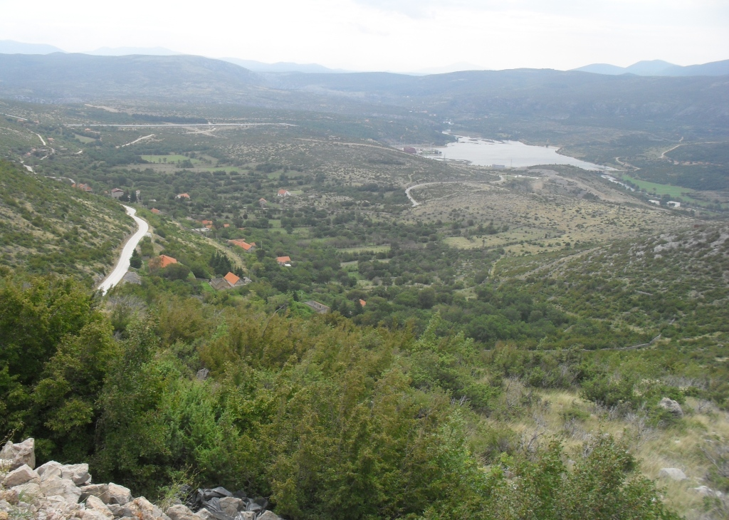 Поглед на Мушковце с Велебита.